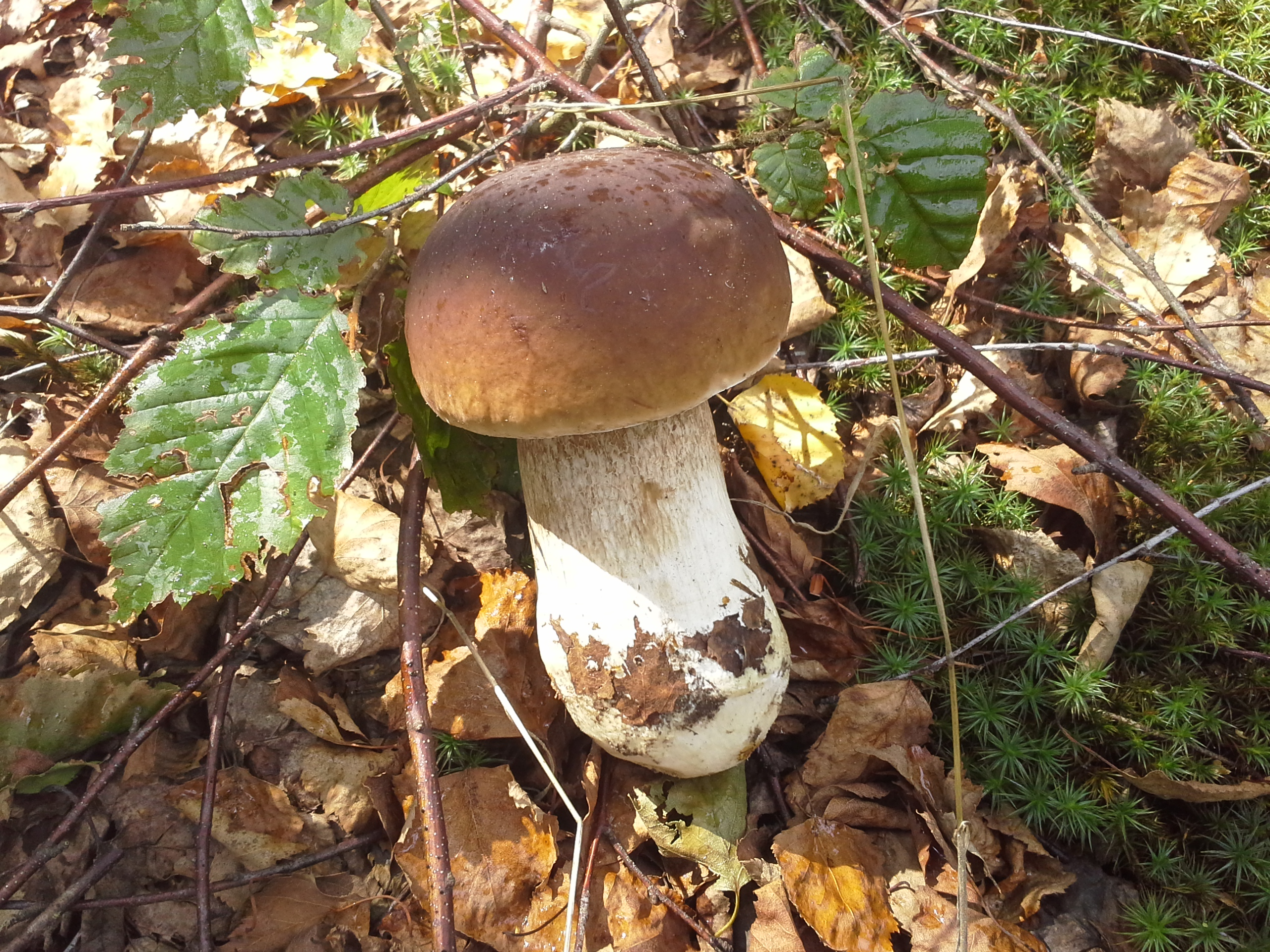 Borowik szlachetny w środowisku naturalnym